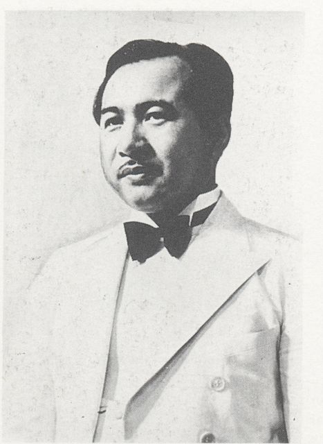 1930年代のブロマイドをスキャン